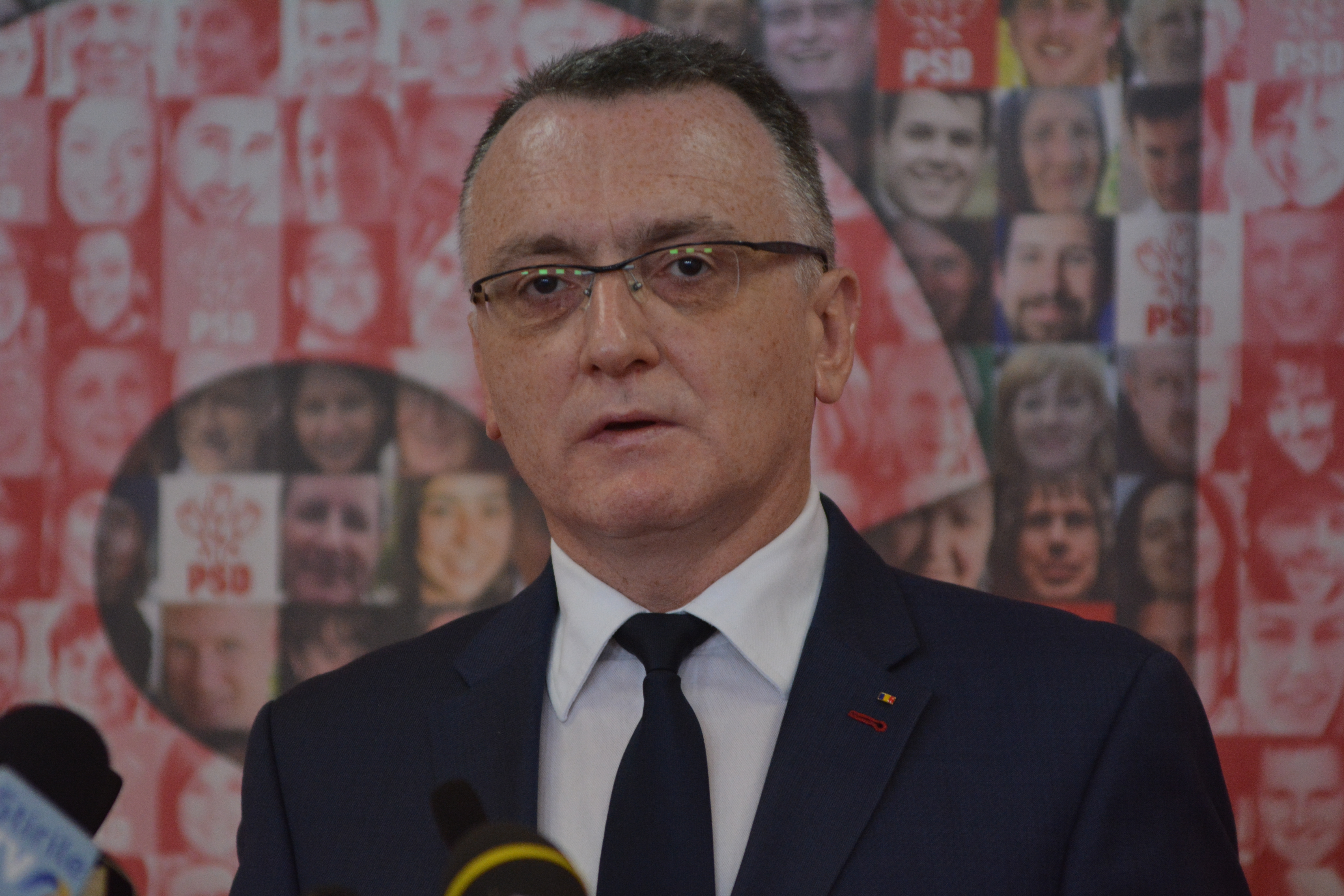 Sorin Cîmpeanu 10 maj 2015